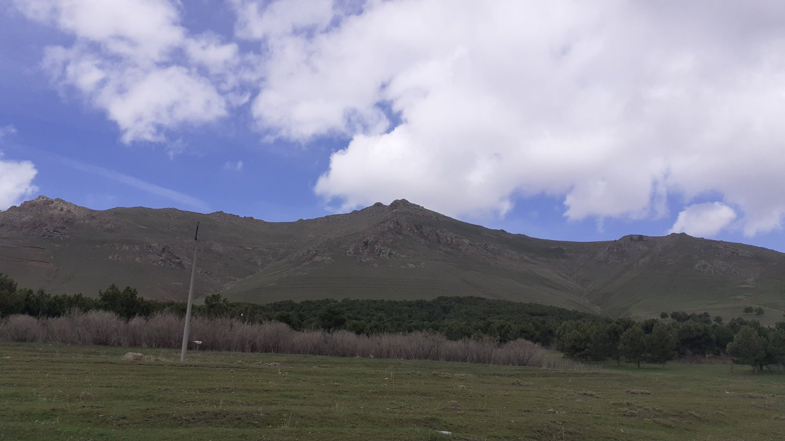 Շողակաթ լեռը Մելիքգյուղից